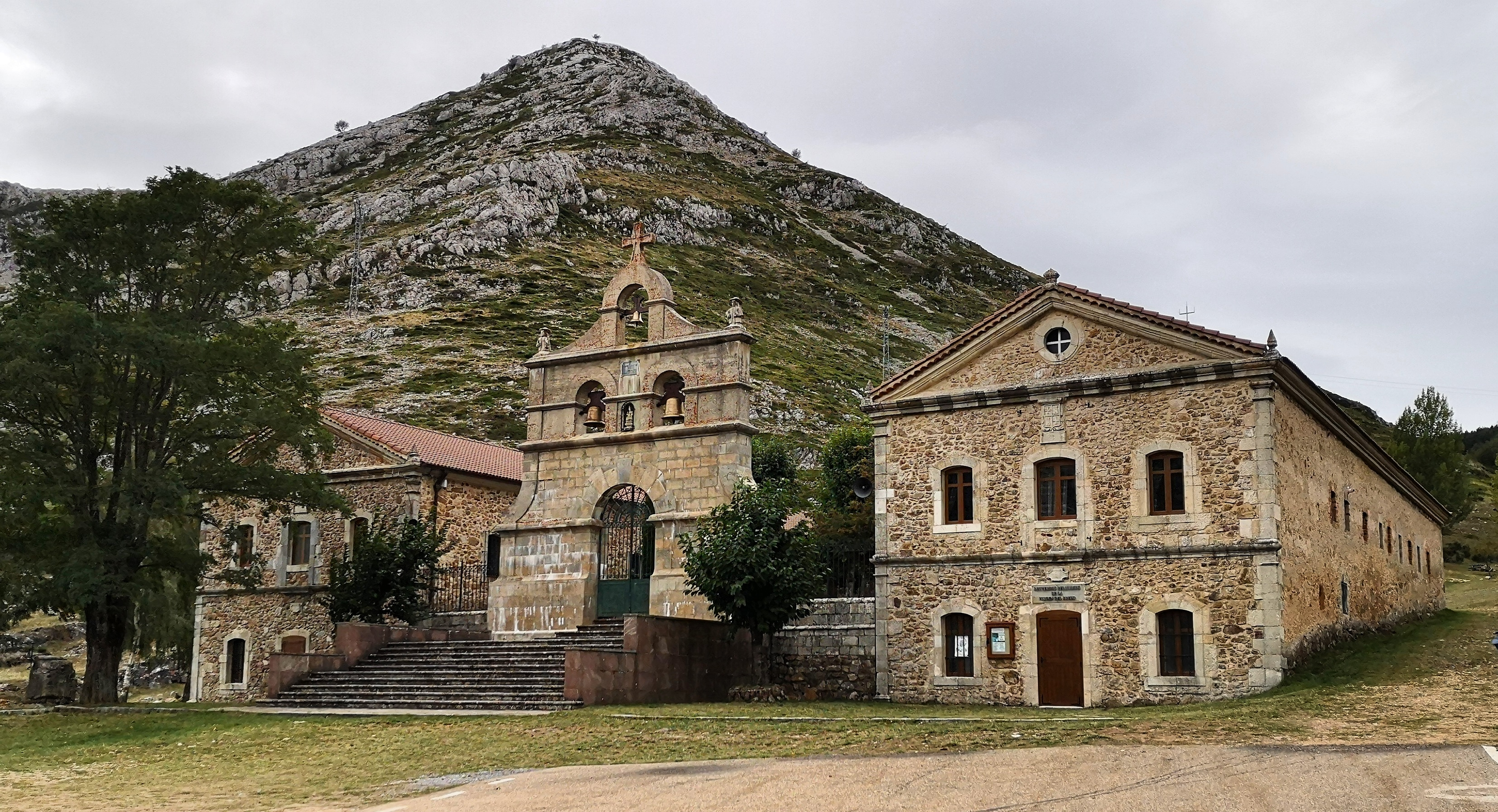 Santuario de la Virgen del Brezo en Villafría de la Peña (España)